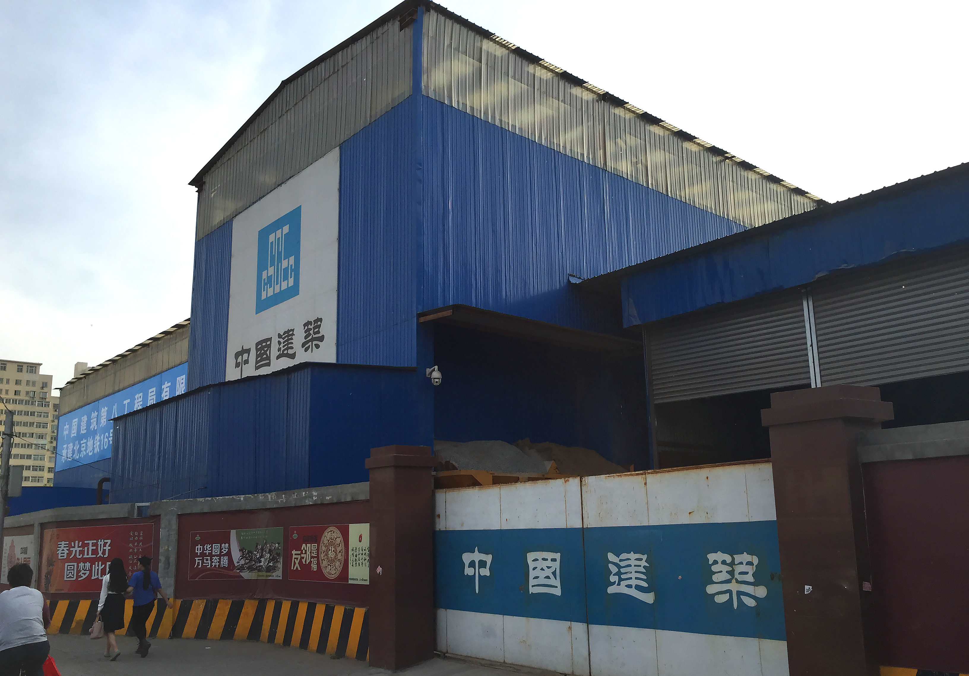 北京地铁16号线万寿寺站工地